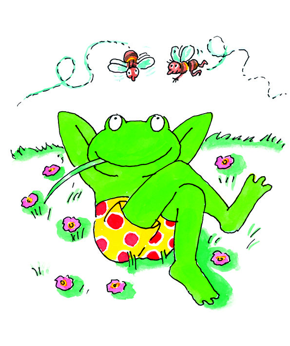 Comicfrosch der Marke Frosch auf einer Wiese